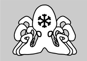 El novedoso sistema de refrigeración del Tesla Model Y lleva impresa la caricatura de un pulpo en el depósito principal.